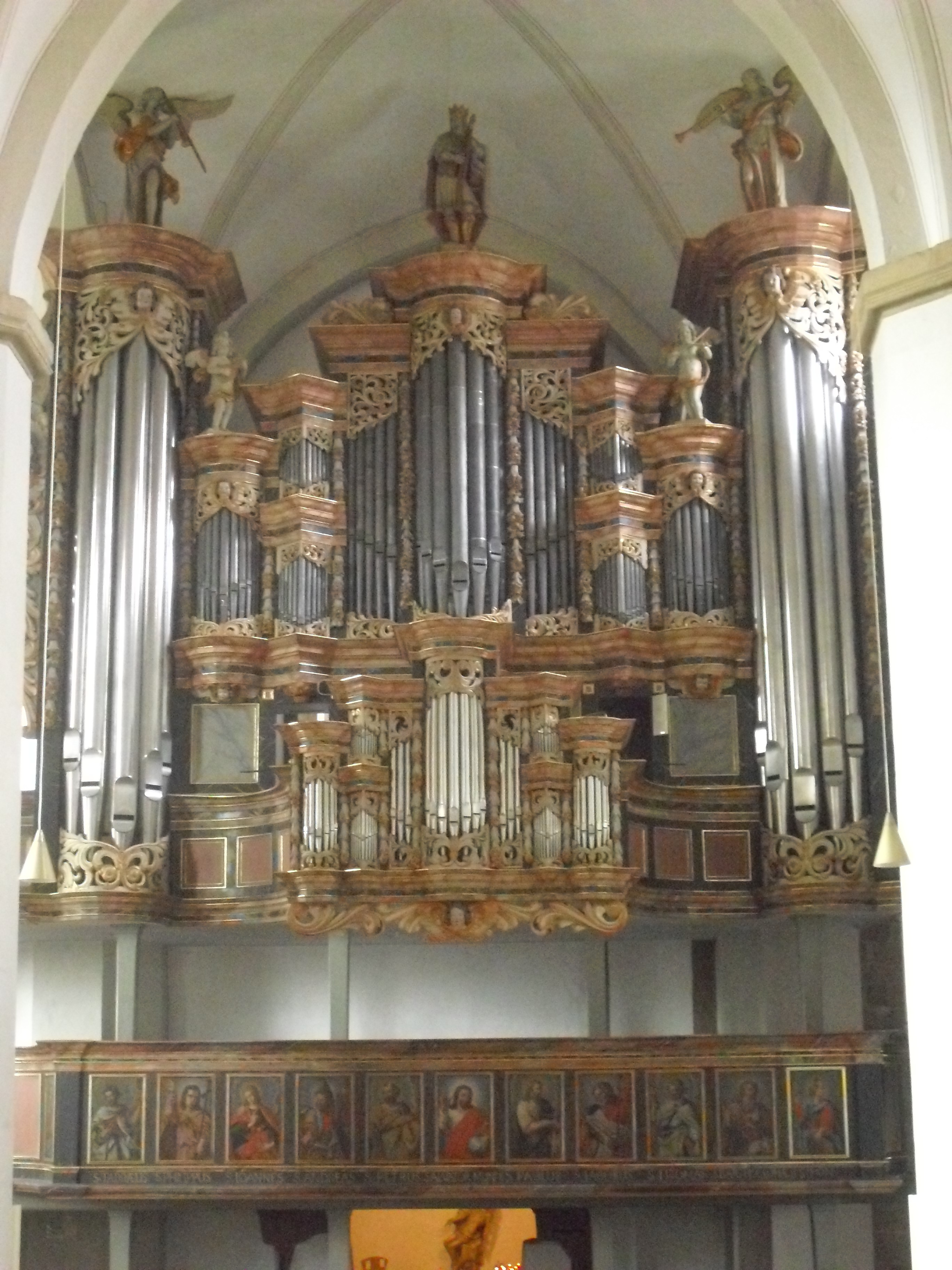 Orgel der Stiftskirche in Neuenheerse